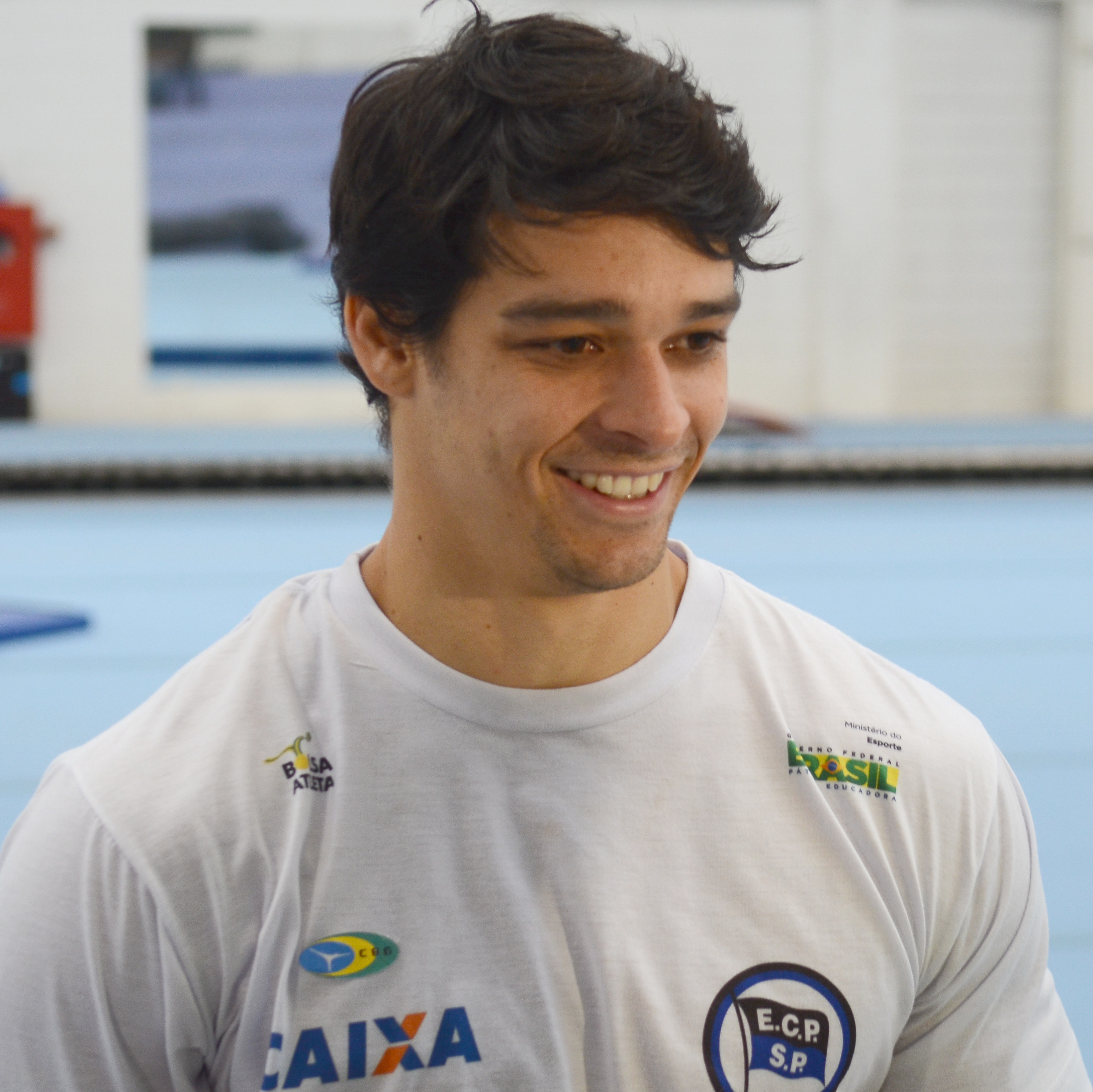 São Bernardo do Campo (SP) - Francisco Barretto fala das espectativas para as Olimpiadas após último treino, antes da competição, da seleção brasileira de ginástica artística (Rovena Rosa/Agência Brasil)